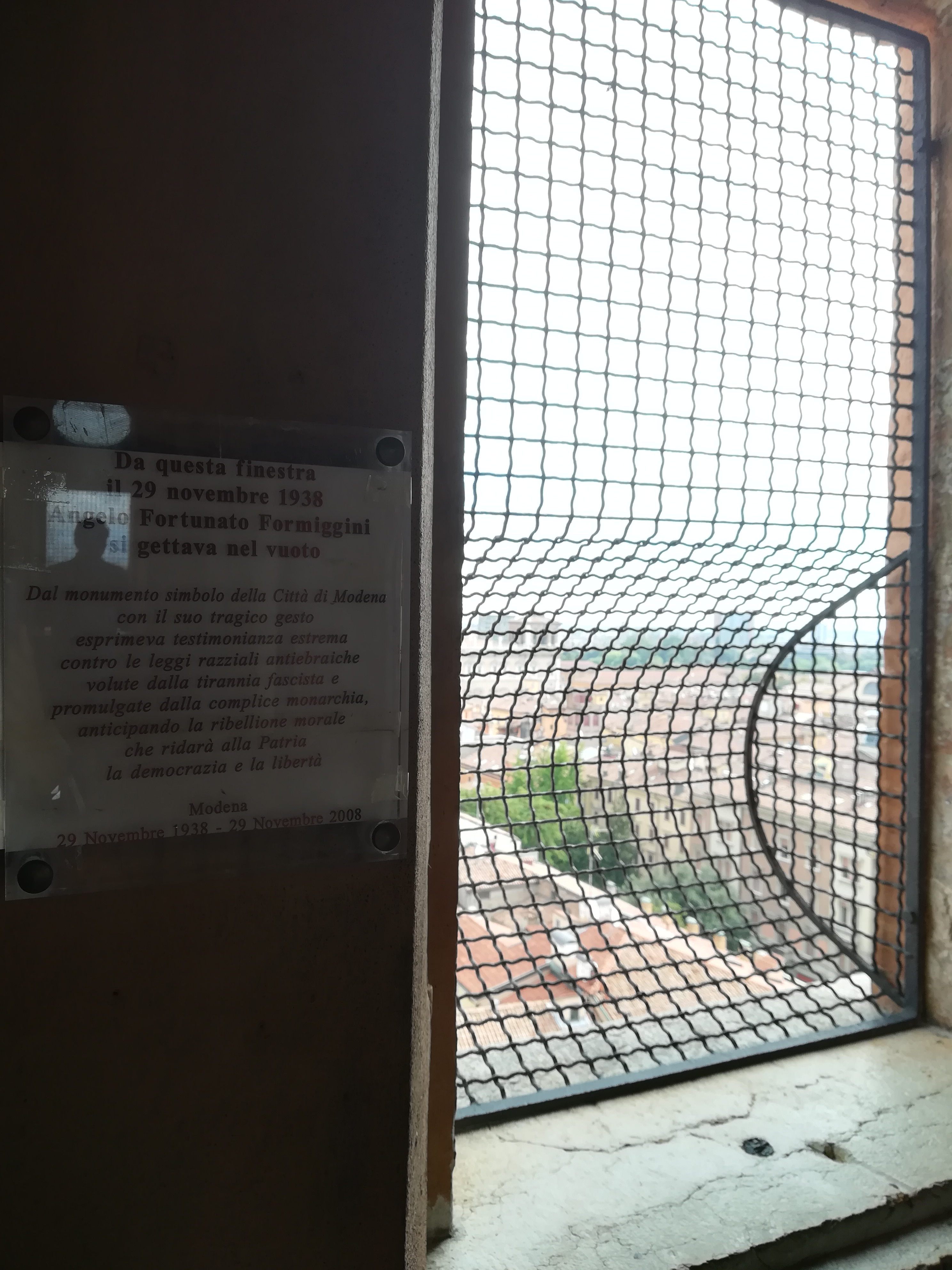 Interno della Ghirlandina (Modena)